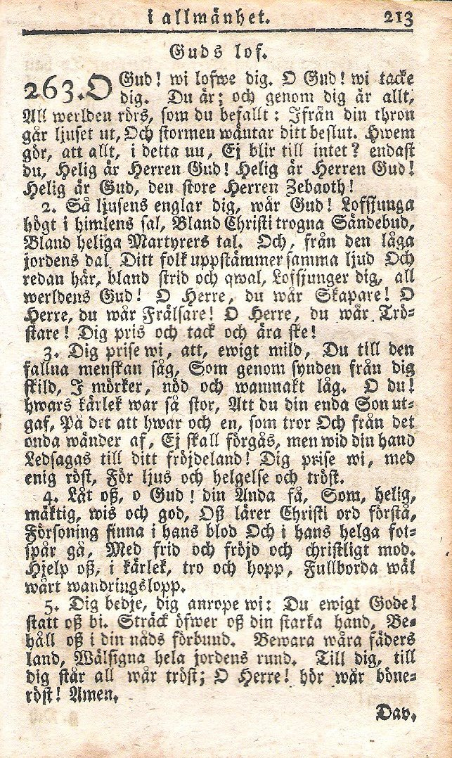 Gud, vår Gud, vi lovar dig ur ett exemplar av 1819 års psalmbok, tryckt 1819.